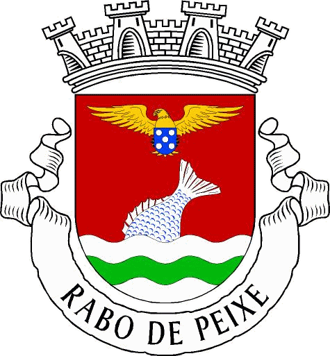 Brasão_rapo_de_peixe